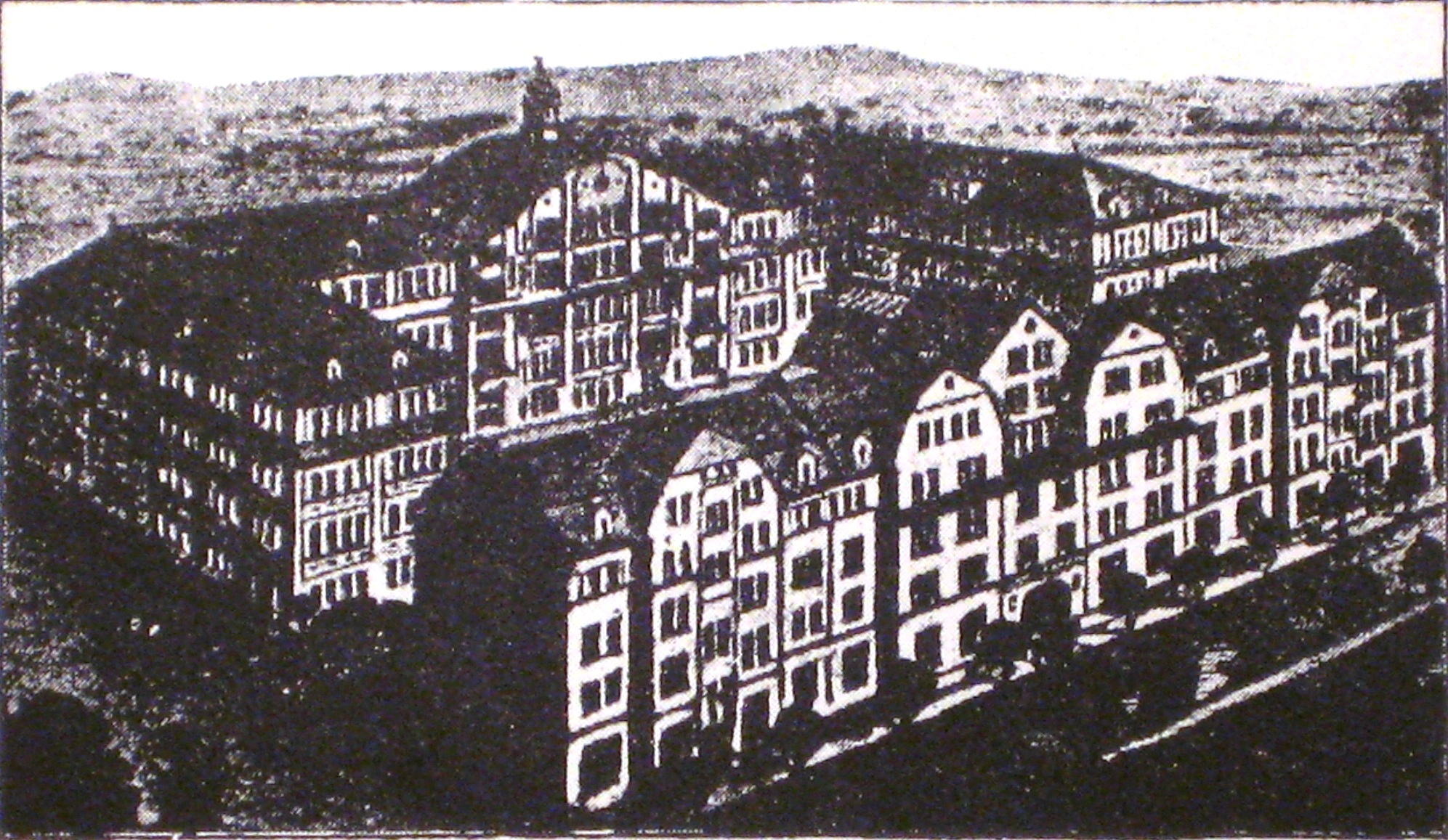 Werksgelände der Frischauf Fahrradfabrik in Offenbach am Main, Repro des Briefkopfes der Firma